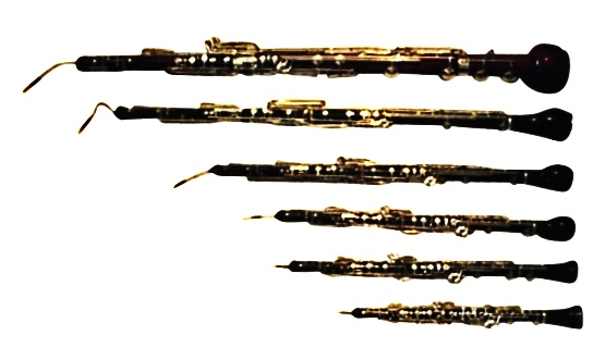 Familia del Oboe - Mussete o piccolo, oboe, oboe d'amore, corno inglés, bajo y heckelphone